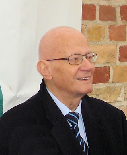 Der Rechtsanwalt und ehemalige Hamburger Erste Bürgermeister Peter Schulz 2010 in Rostock.